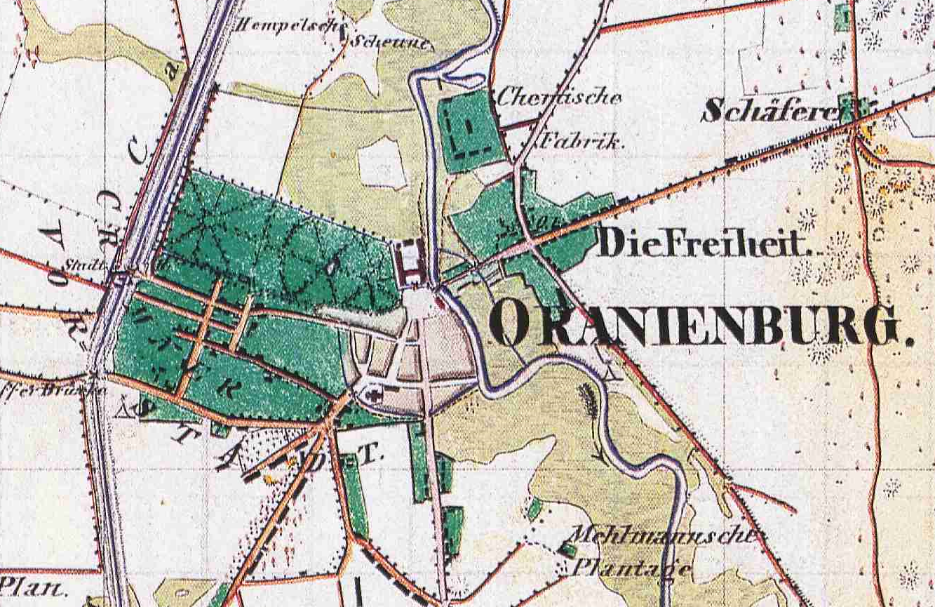 Oranienburg, Landkreis Oberhavel, Brandenburg, Ausschnitt aus dem Urmesstischblatt 3245 Oranienburg von 1839